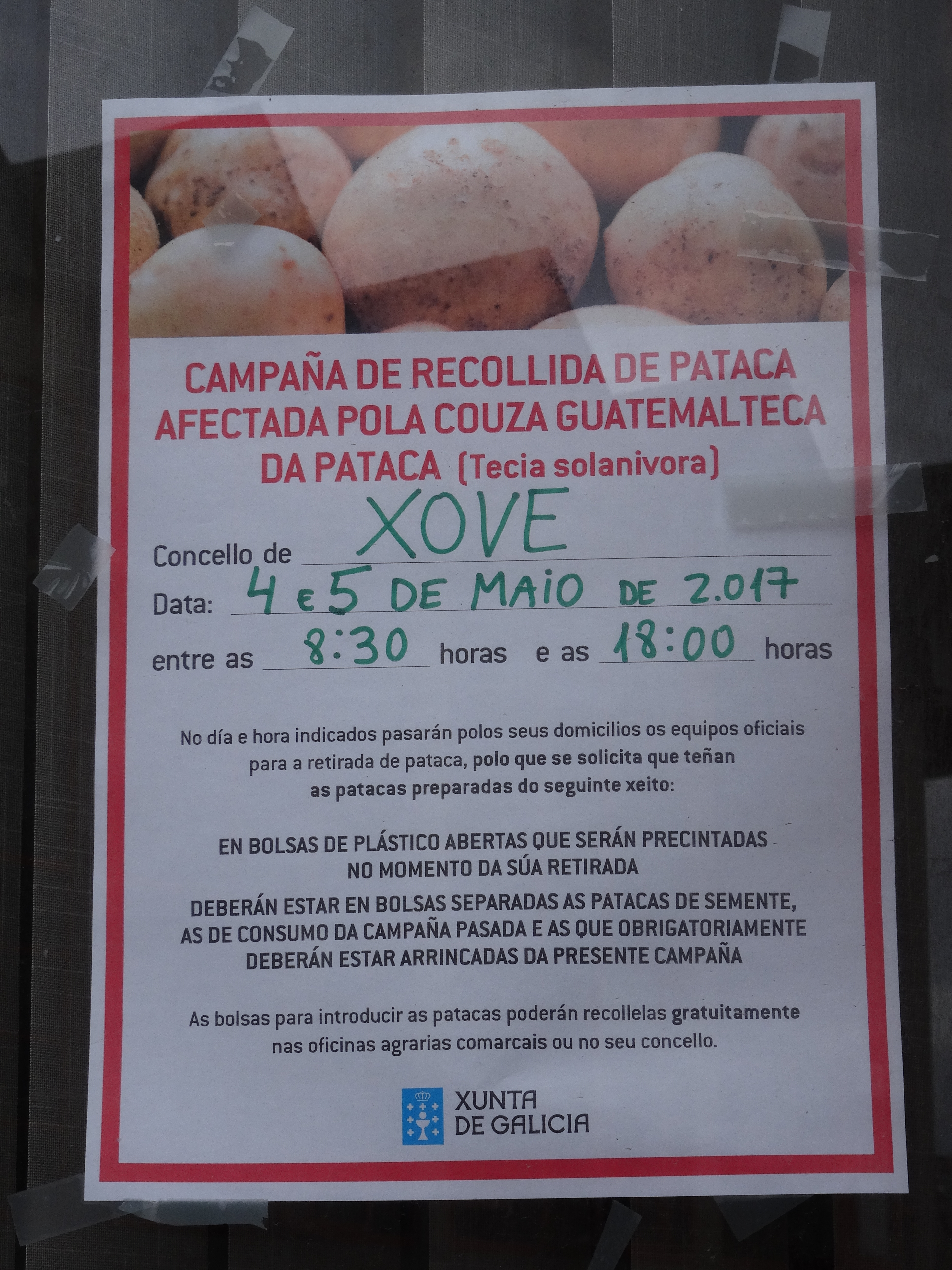 Ver título